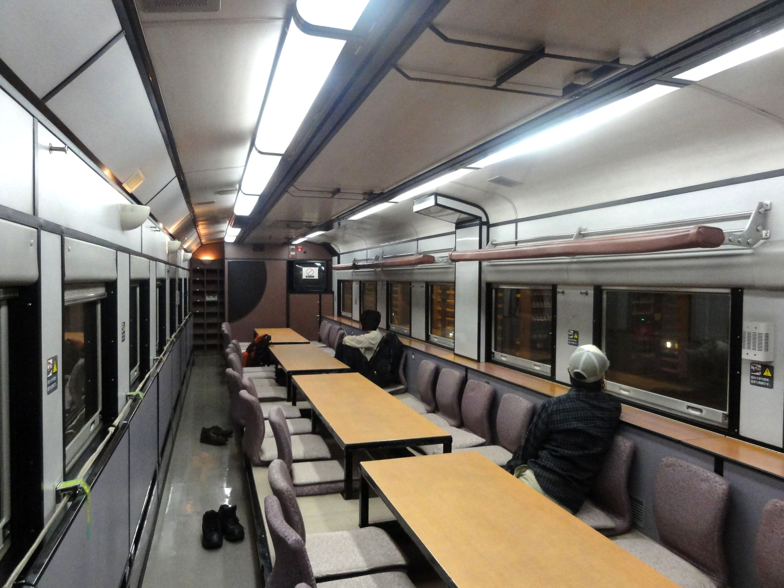 キハ400-502・車内